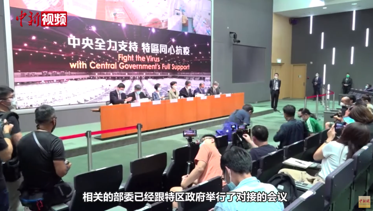 香港将开展全港新冠病毒检测 市民自愿参加